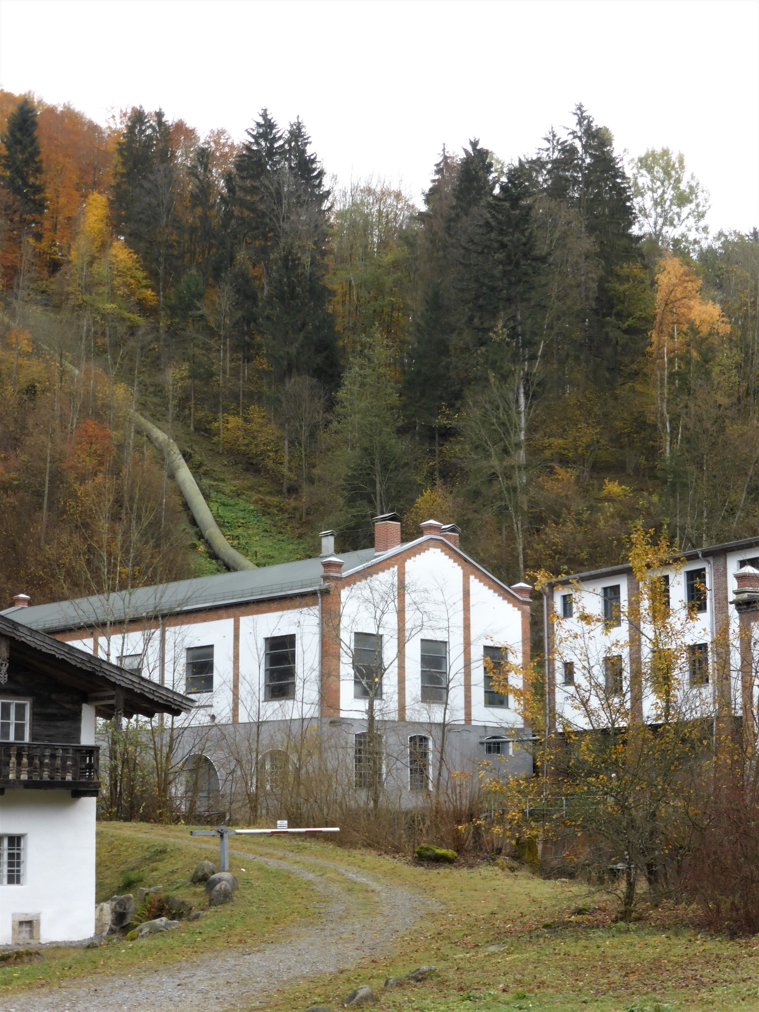 Ehemaligen Carbidwerk in Freyung, Aigenstadl 1. Turbinenhaus, Fabrikationshallen, Ofenhaus mit Schlot, verschlämmte Ziegelbauten von 1900 - 04 von Baumeister Max Stadler.This is a photograph of an architectural monument.